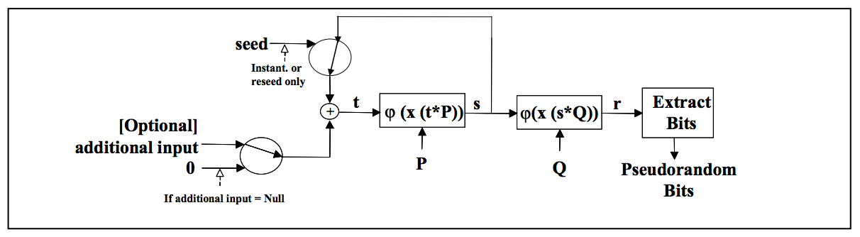 схема генератора псевдослучайных чисел Dual_EC_DRBG